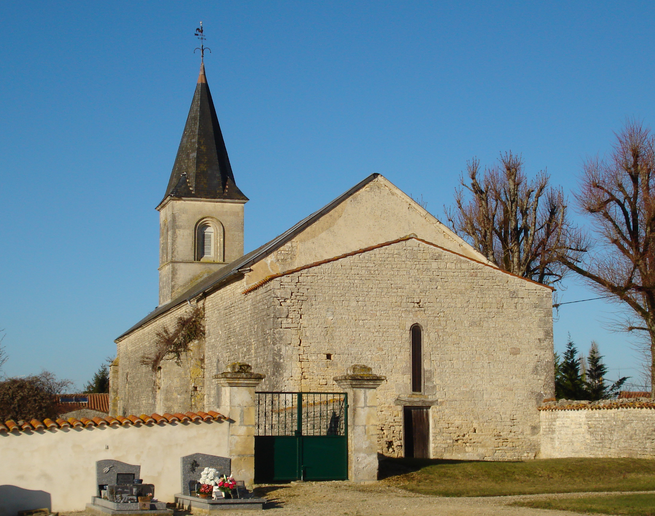 L'église de Saleignes en Charente-Maritime